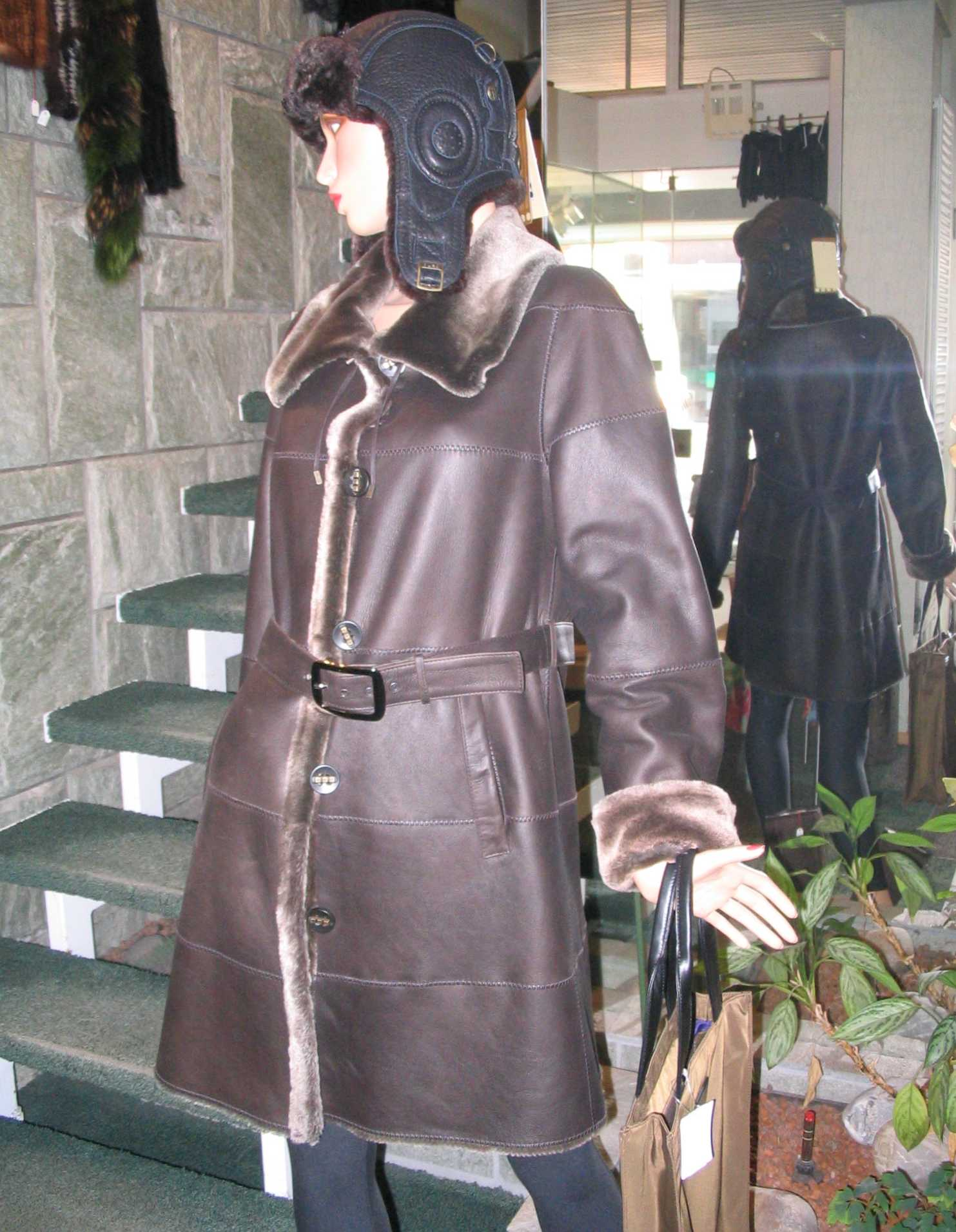 Nappierter Lammfellmantel. Gesehen im Pelzhaus Schad, Ludwigshafen.